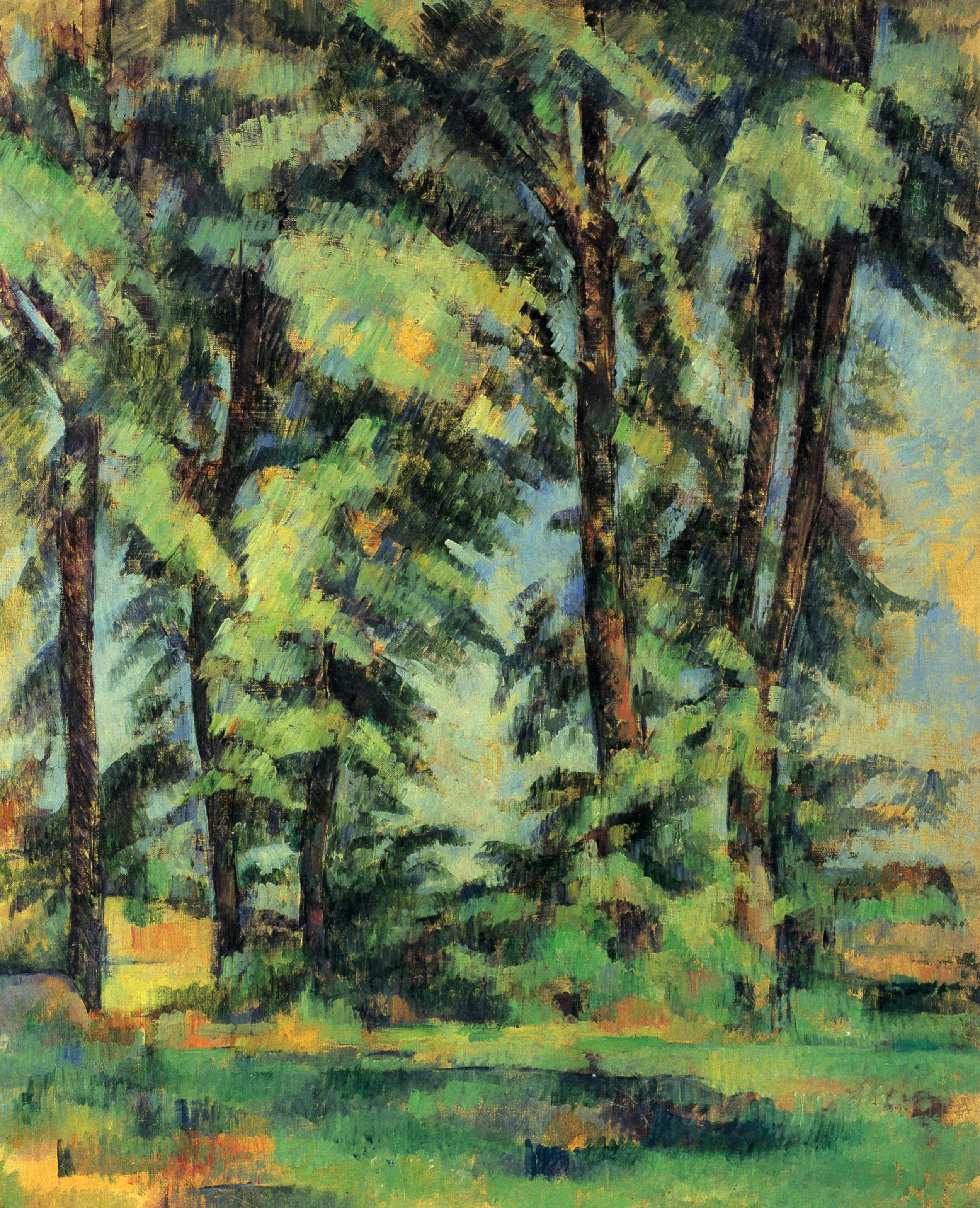 Hohe Bäume im Jas de Bouffan